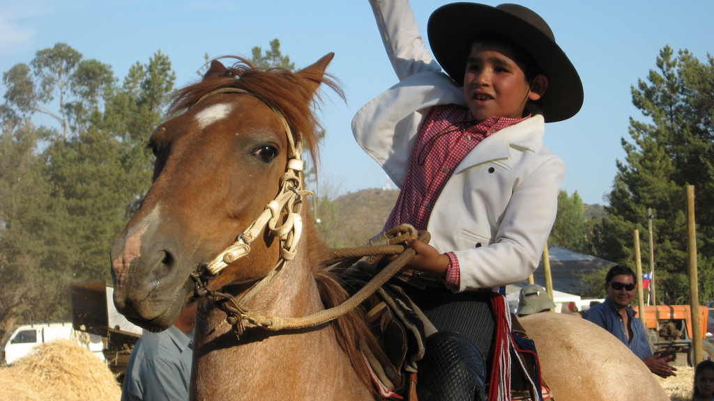 Niño del campo chileno.